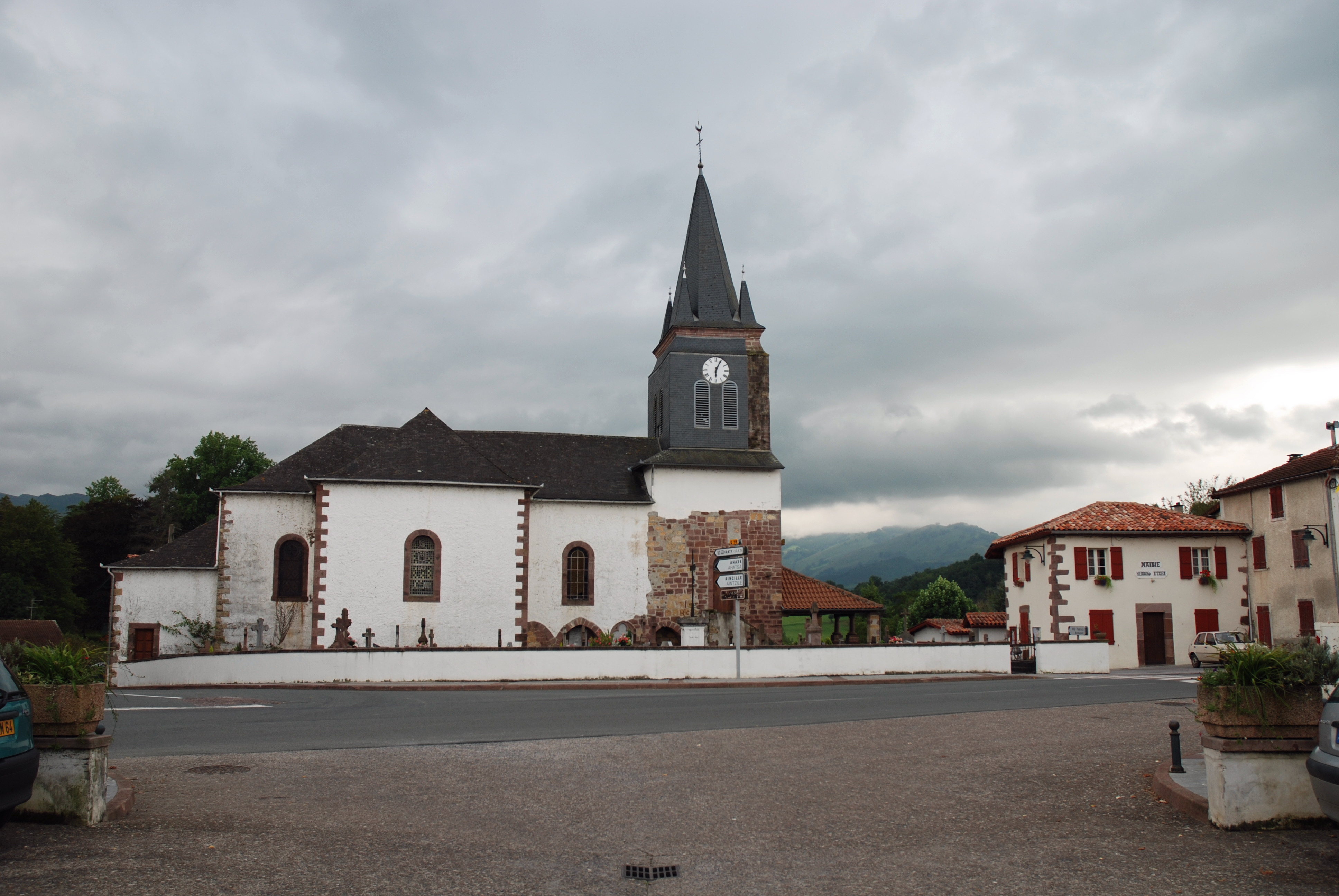 Saint-Jean-le-Vieux, l'église Saint-Pierre d'Usakoa et la mairie